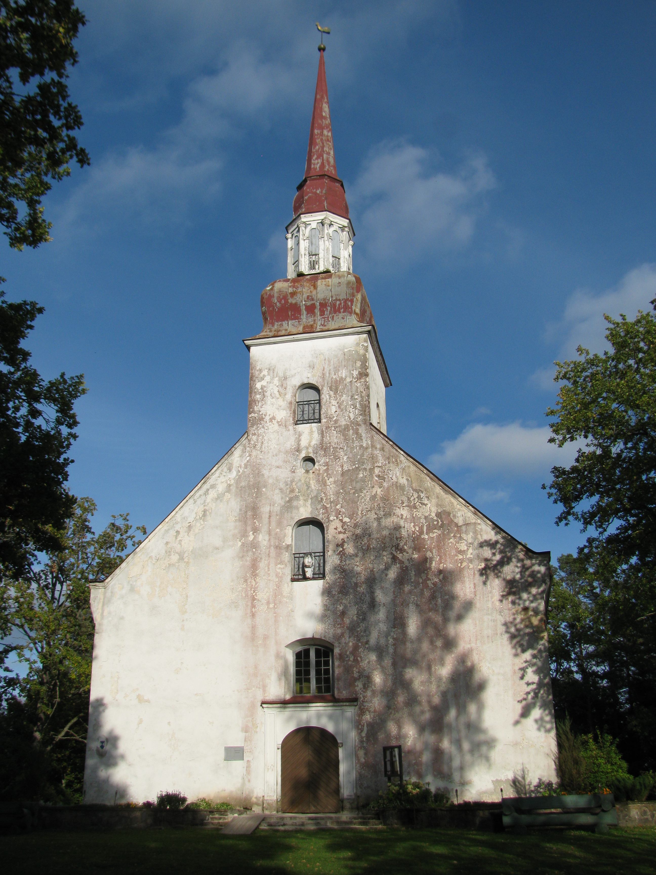 Apekalna (Opekalna) luterāņu baznīca, Jaunlaicenes pagasts